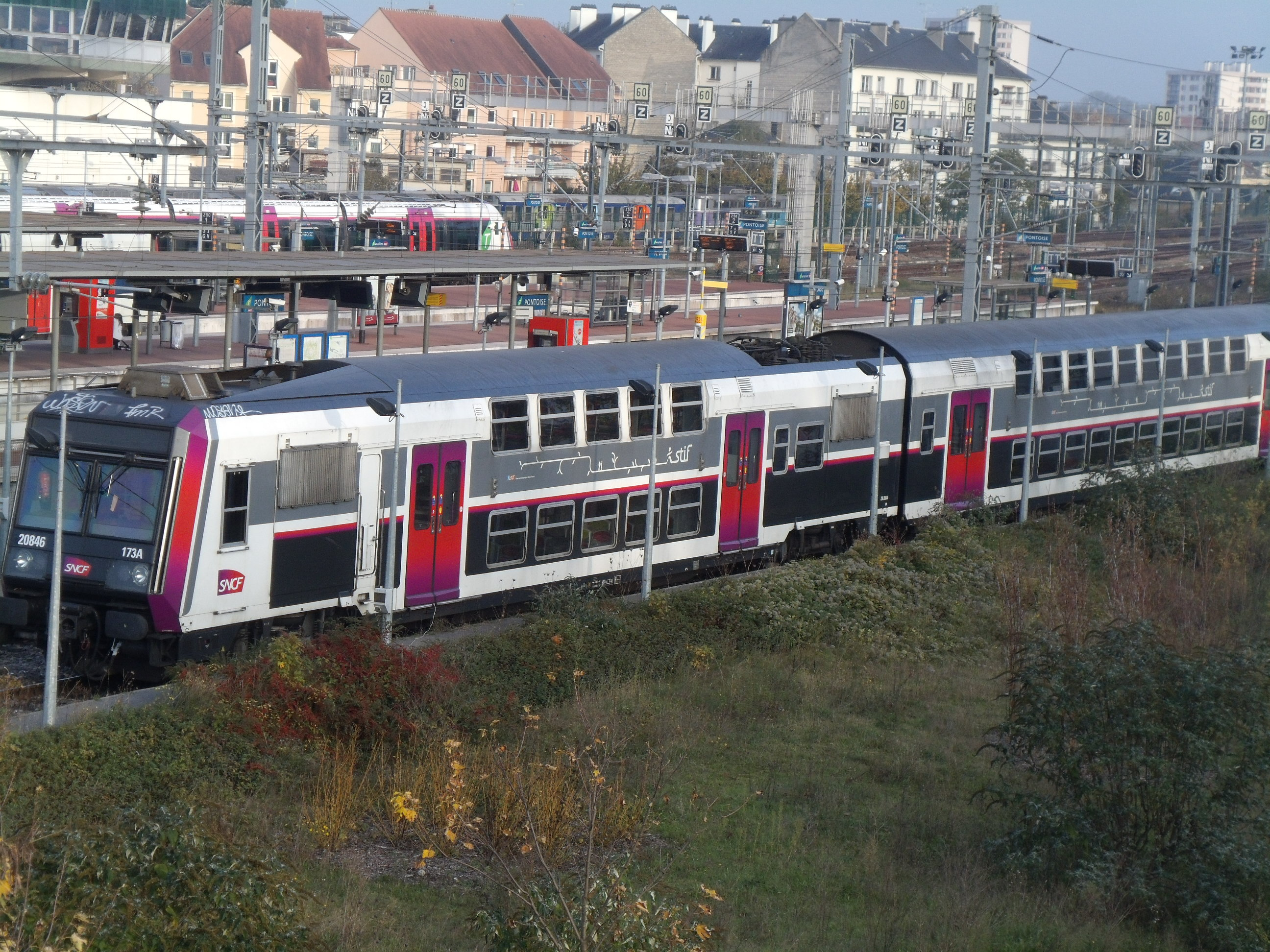 La Z 20846 en livrée carmillon le 16 novembre 2013 stationnée en gare de Pontoise